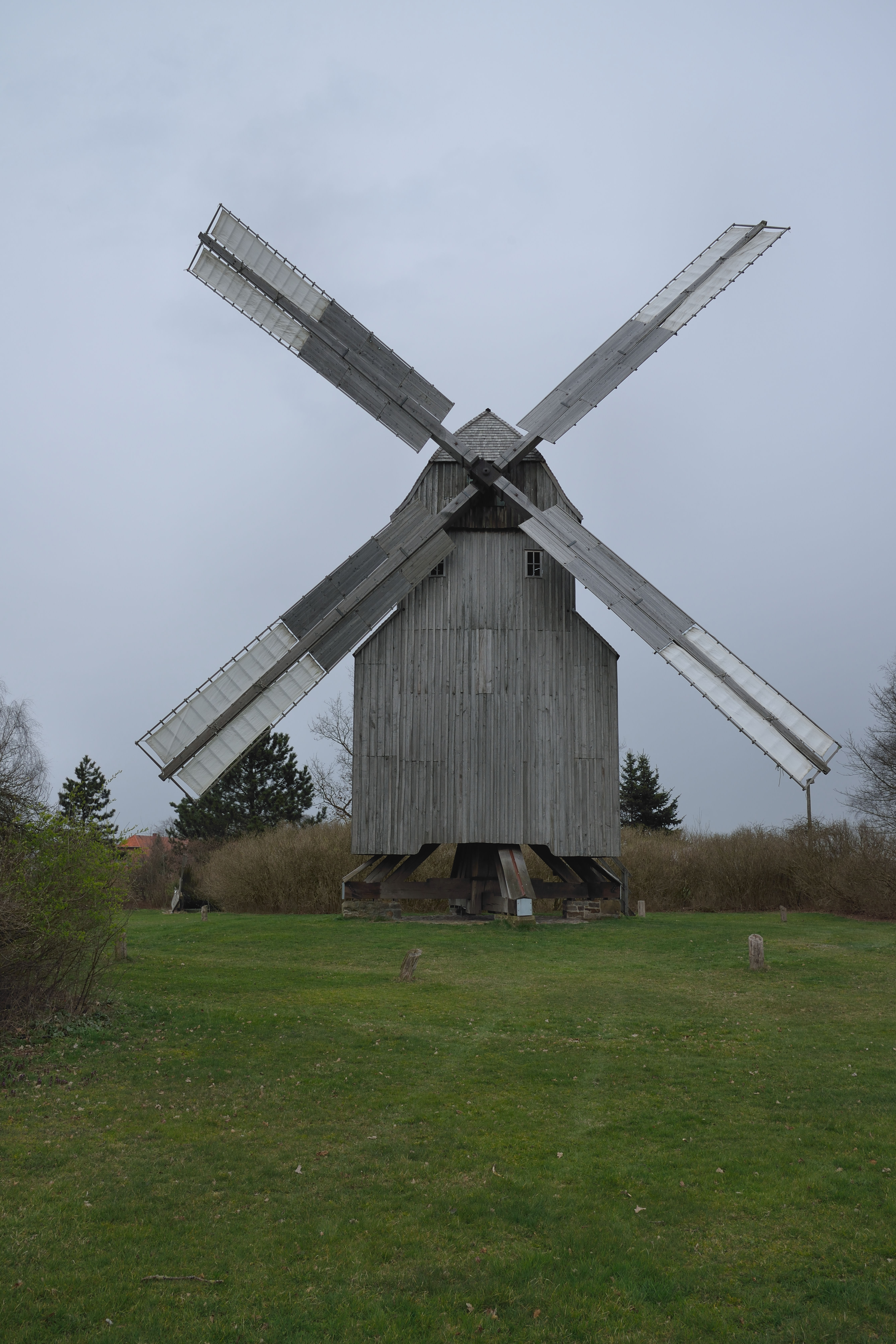 Bockwindmühle Oppenwehe in Duitsland